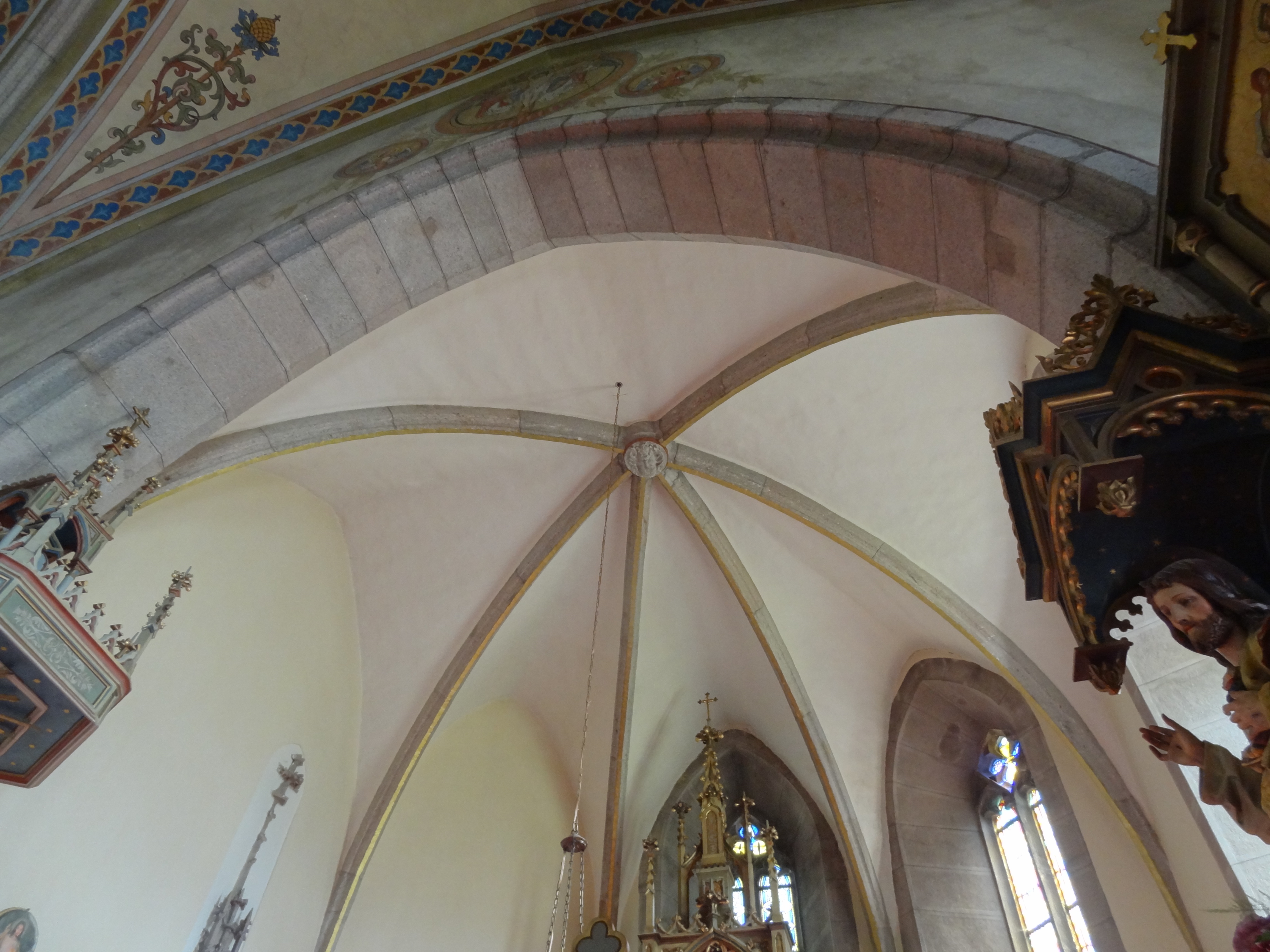 Rebrová lunetová klenba s svorníkom v motíva Krista